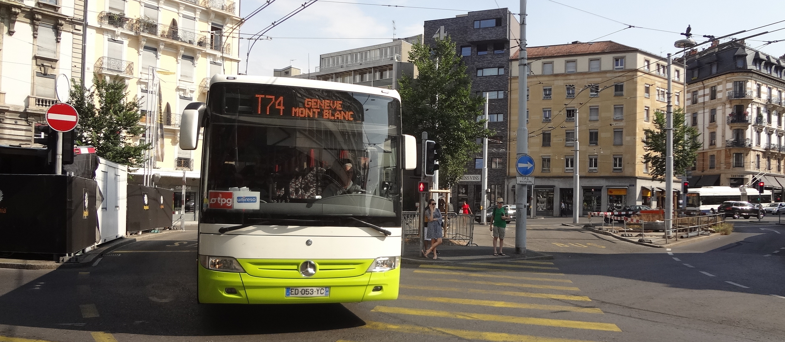 Place des Eaux-Vives à Genève. Bus de la ligne T74 « Genève Mont-Blanc » au centre de la place.